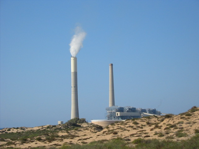 תחנת הכוח רוטנברג על רקע חולות אשקלון